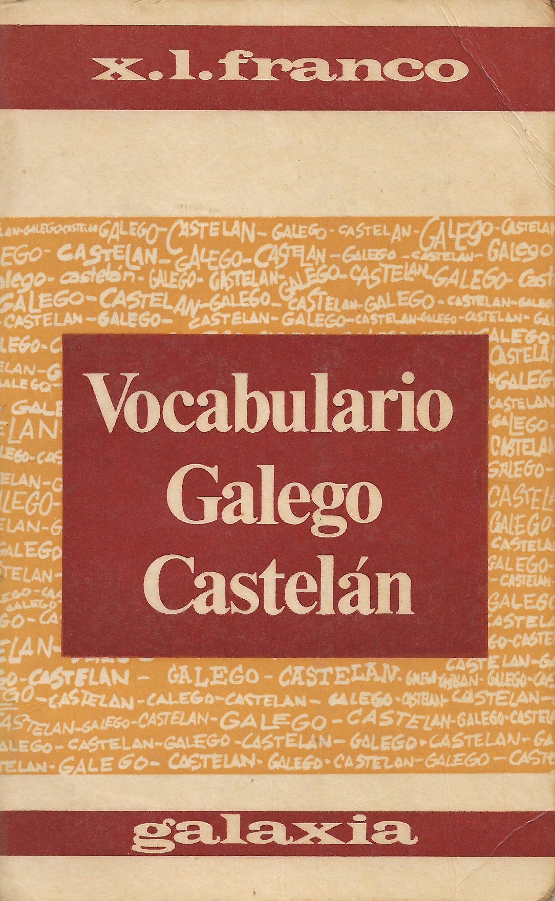 portada do 'Vocabulario Galego Castelán' de Xosé Luís Franco Grande publicado por Editorial Galaxia (1972)